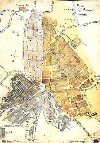 Mappa Borbonica dell'archivio cartografico Mortillaro di Villarena (1837-1853) di CL della prima metà dell'800. Si notano con i diversi colori i 4 quartieri della città: 1) San Rocco quadrante Nord-Est 2) Santa Venera quadrante in giallo 3) Zincari quadrante più scuro 4) San Francesco quadrante Sud